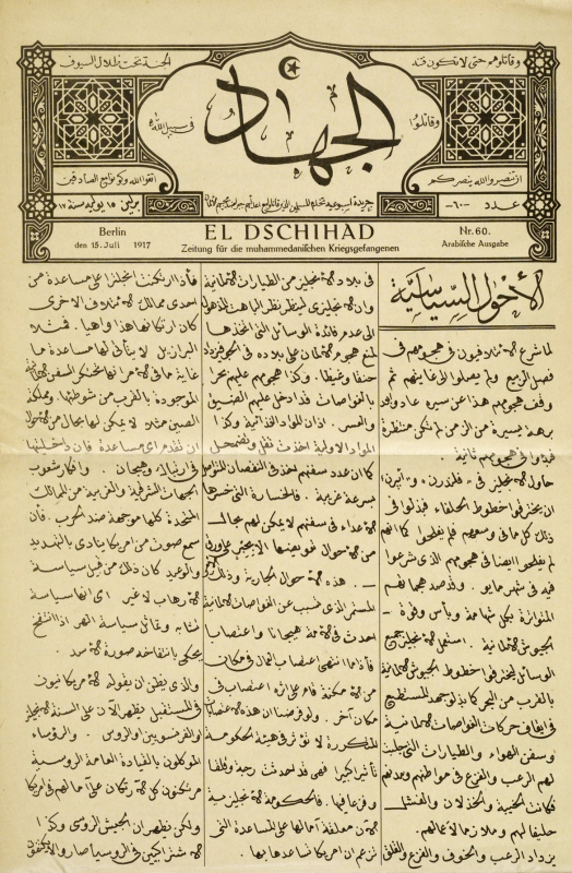 Die erste Seite der 60. Ausgabe von El Dschihad vom 15. Juli 1917